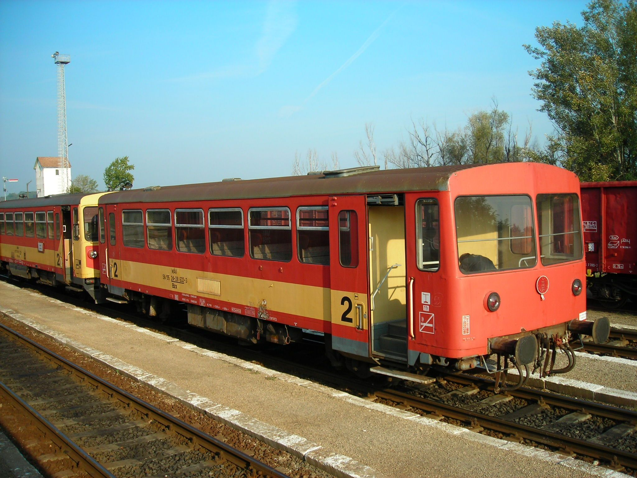 BZmot mellékkocsi